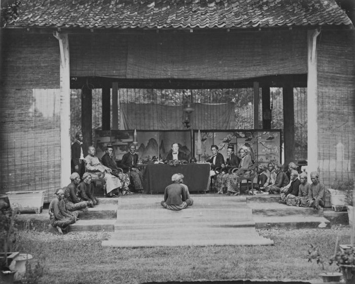 foto. Zitting van de Landraad te Pati in het district Japara, voorgezeten door resident P.W.A. van Spall, president van het hof